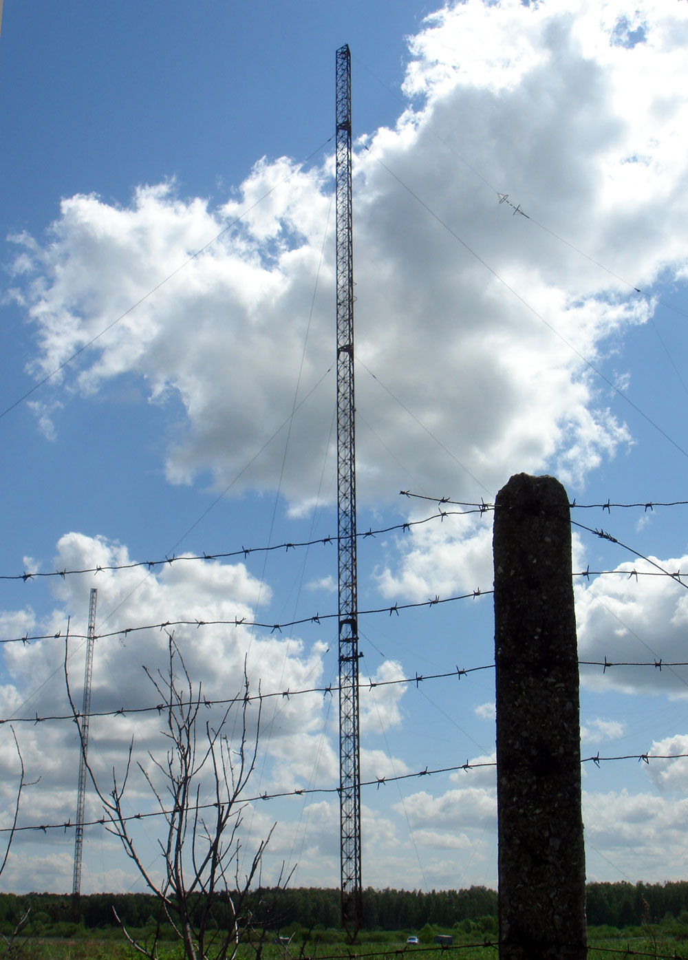 Мачта радиостанции «Голиаф». Справа у основания башни — легковая машина.